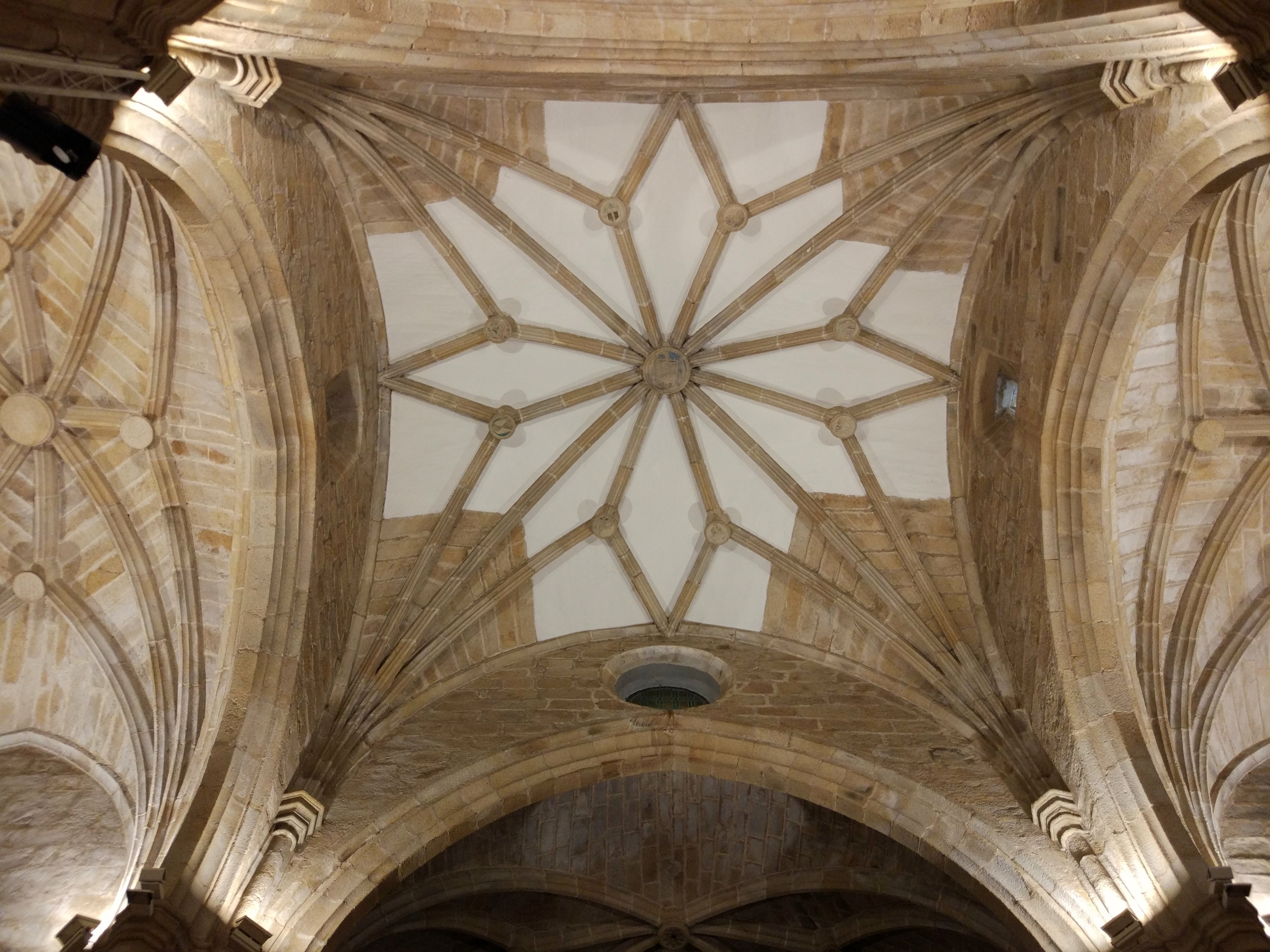 Bóveda en el monasterio de San Francisco el Real, Cáceres, España.